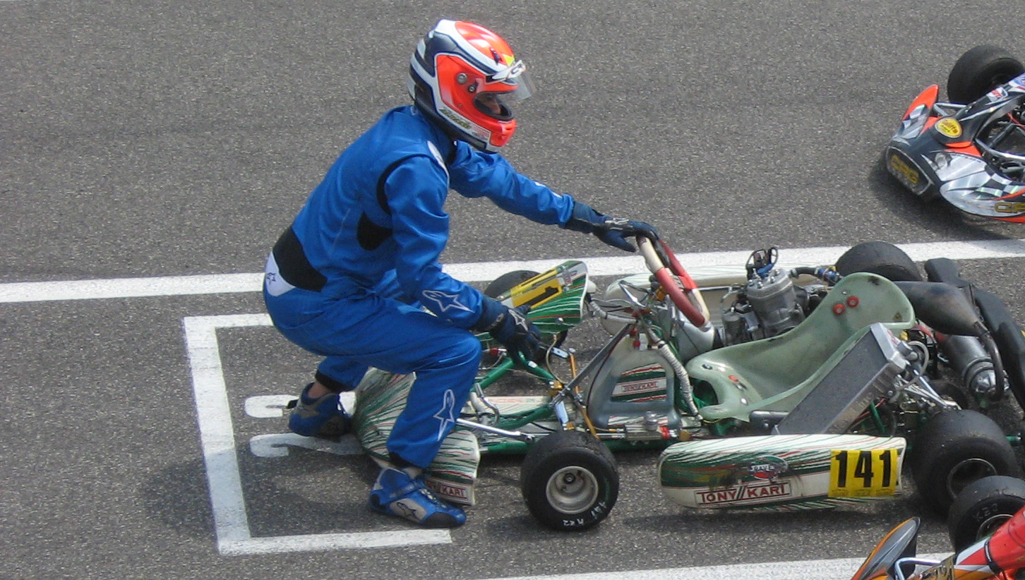 Un telaio Tony Kart impegnato nella tappa di Viterbo del Campionato italiano 2011.